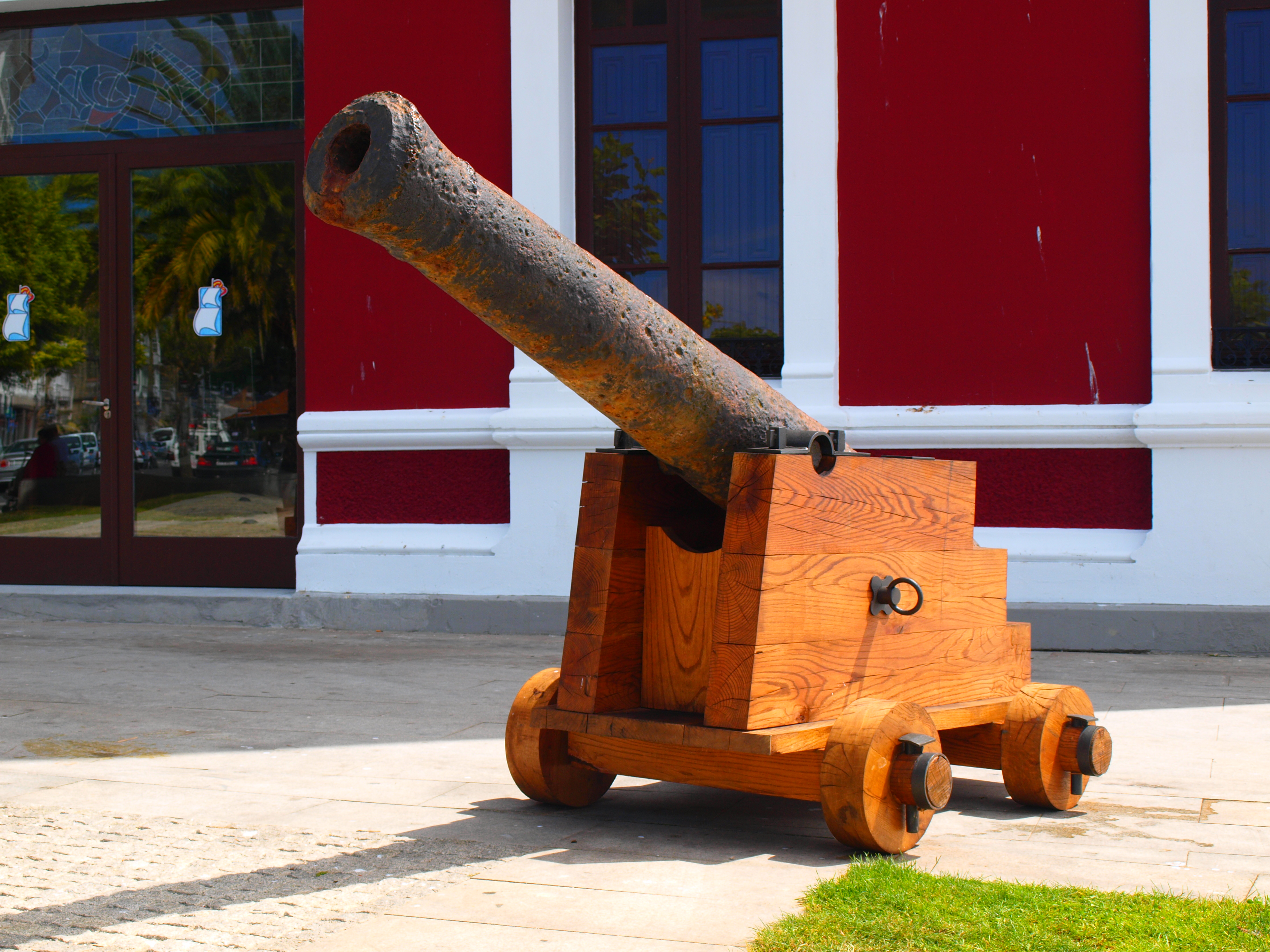 Cañón recuperado de la Fragata Magdalena. Esta fragata, junto al Bergantín Palomo, se hundieron frente a la localidad de Viveiro en el año 1810.